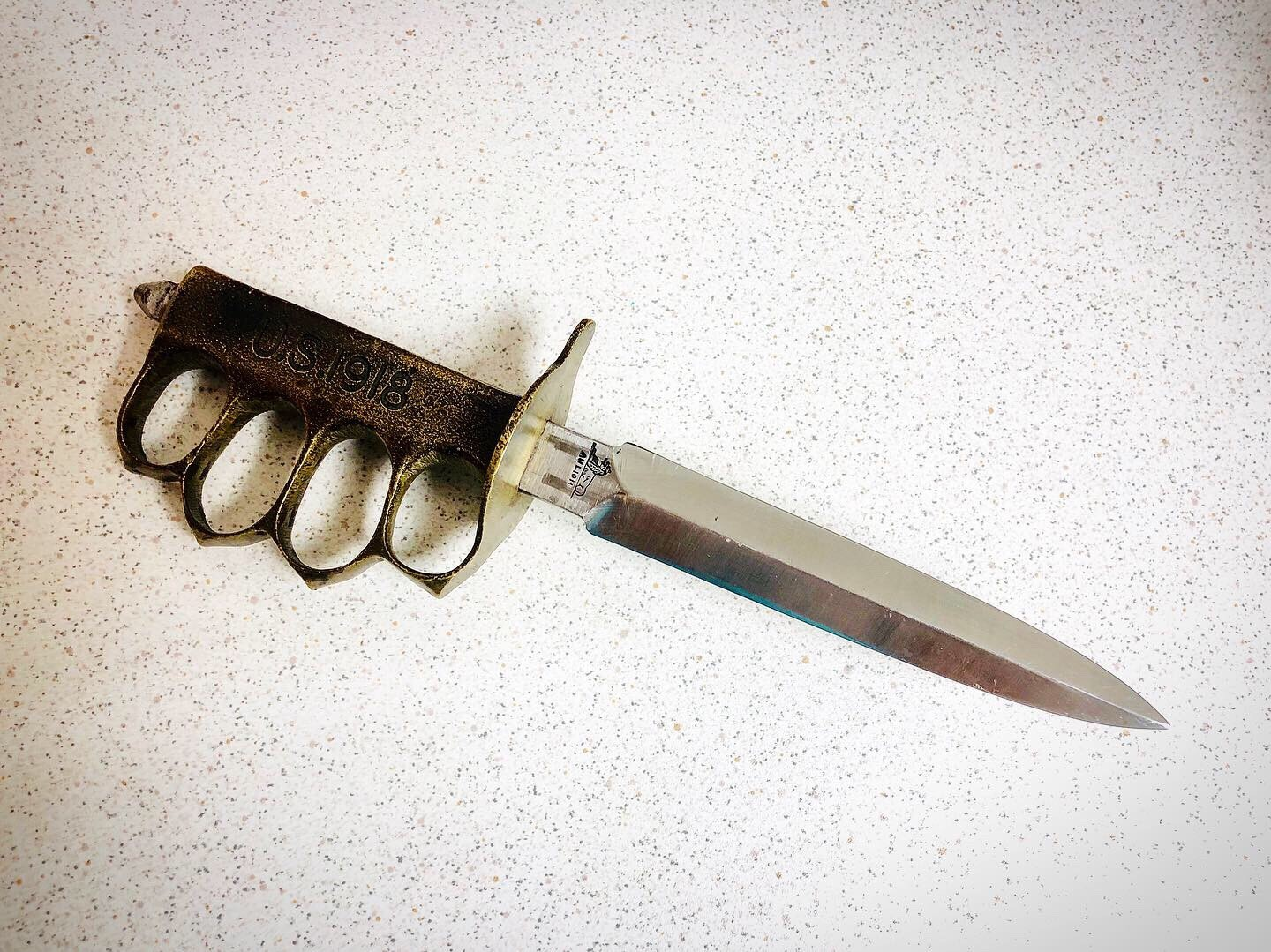 Aulion mark 1 trench knife